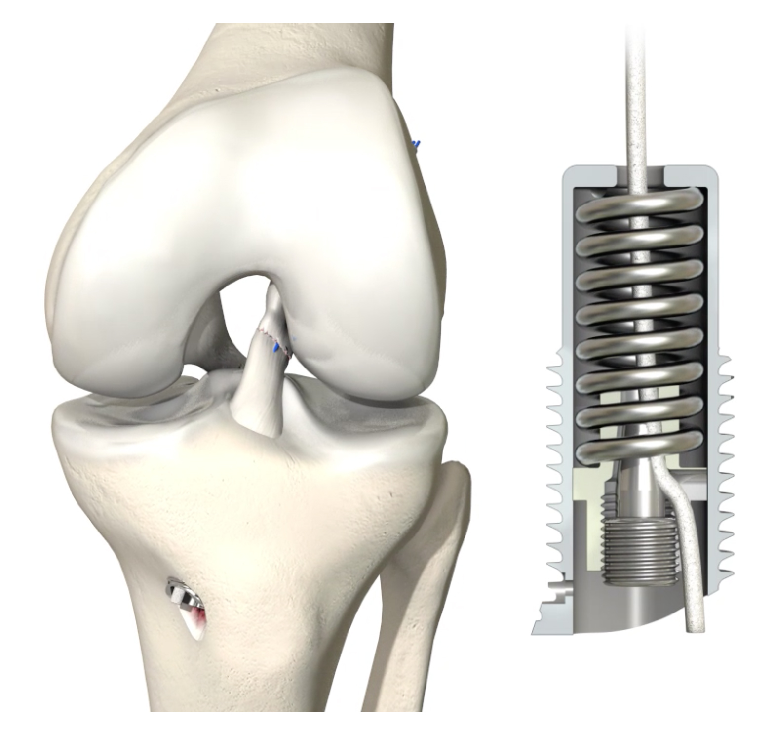 Durch die Ligamys Schraube wird das Kniegelenk dynamisch stabilisiert, so dass das gerissene Kreuzband wieder zusammenheilen kann.